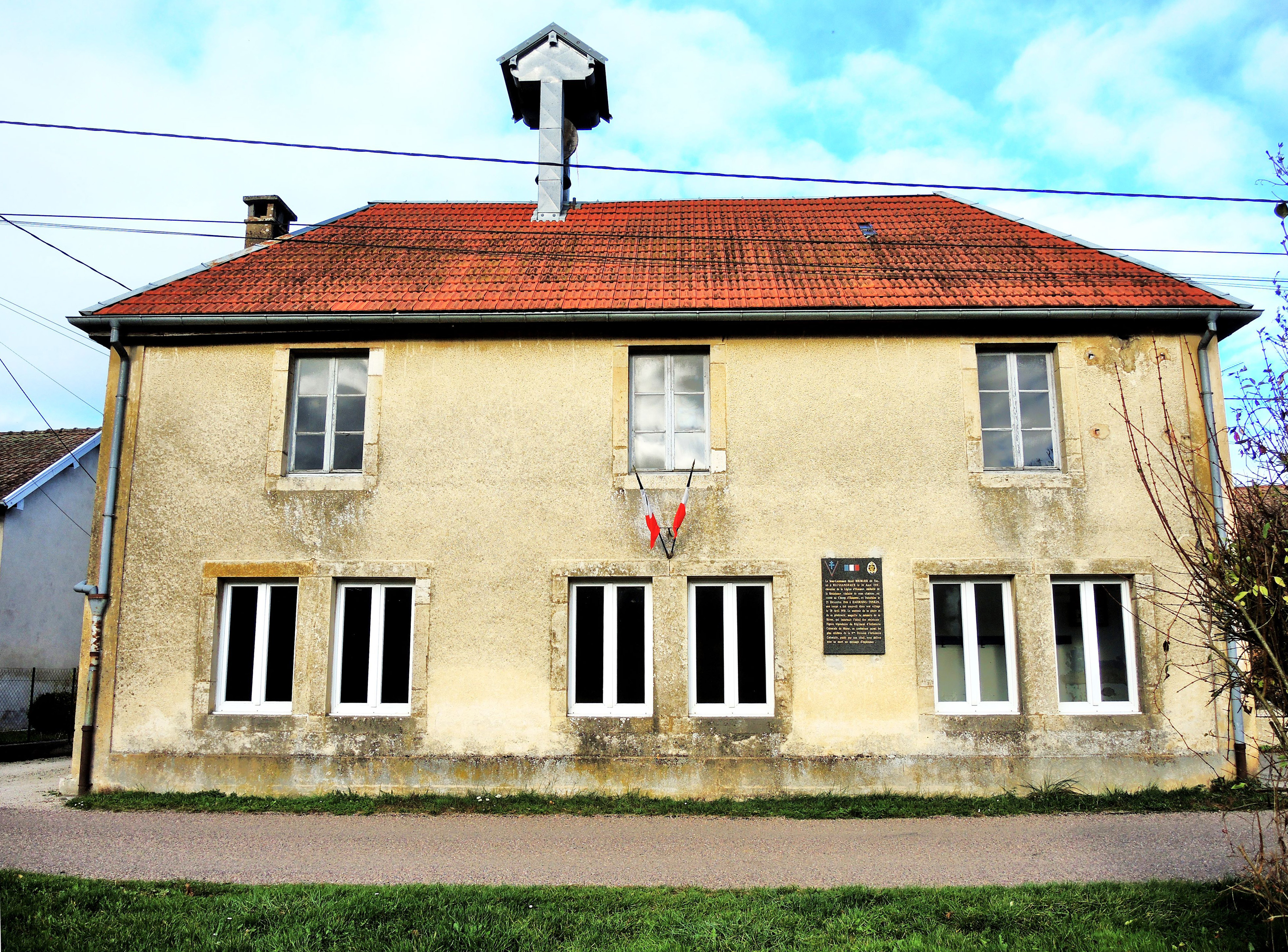 Mairie du village de Bussangeaux. Département du Doubs. France.